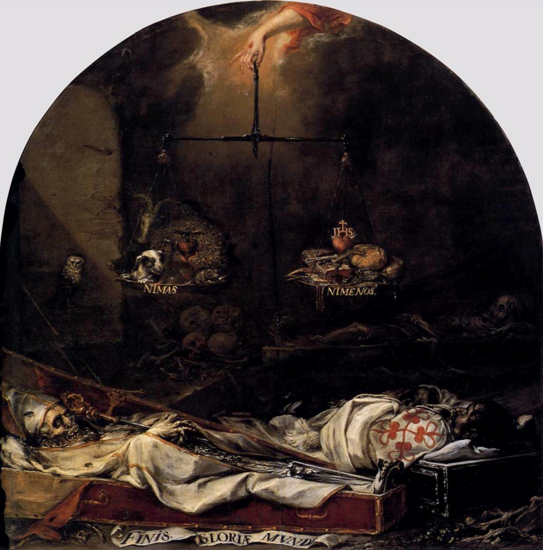 Esta obra, junto con la que lleva por título In ictu oculi, le fue encargada a Juan de Valdés Leal para ser colocada en el sotocoro del Hospital de la Caridad de Sevilla, y al igual que en las pinturas del género Vanitas, aluden a la banalidad de la vida terrena y a la universalidad de la muerte, aunque también quedan unidas con el fin primordial de la Hermandad de la Caridad de Sevilla, que era el de enterrar a los ajusticiados e indigentes de la ciudad, al igual que otras hermandades similares existentes en España en esa época.